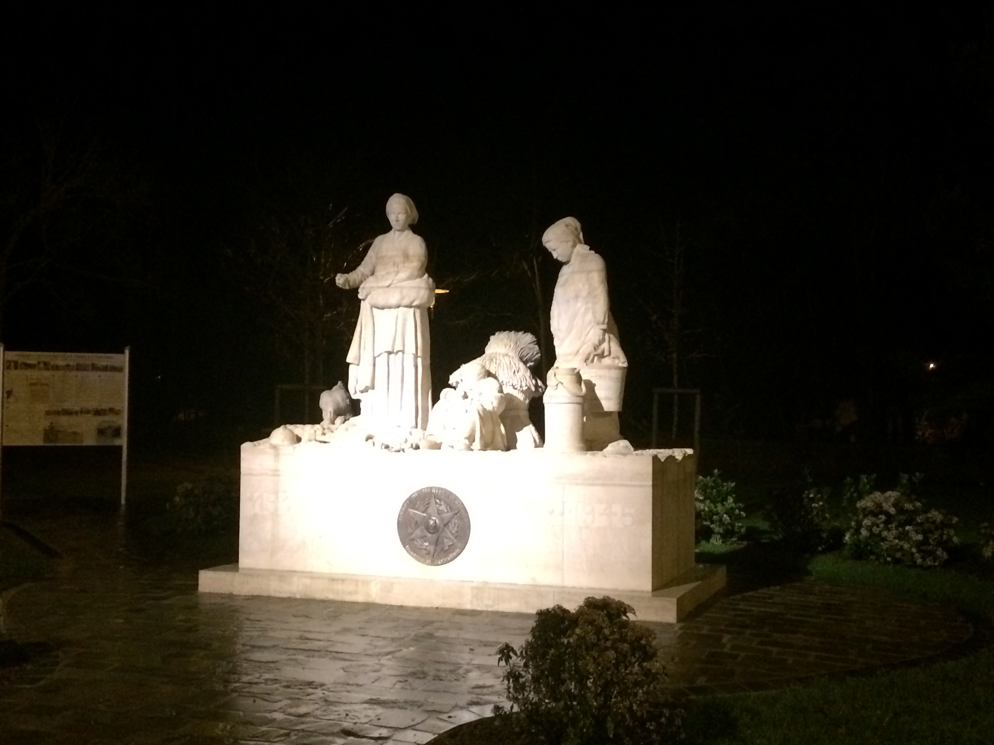 Photo du Monument en honneur aux femmes du monde rural « « Honneur et agriculture » érigé le 19 juin 2016.